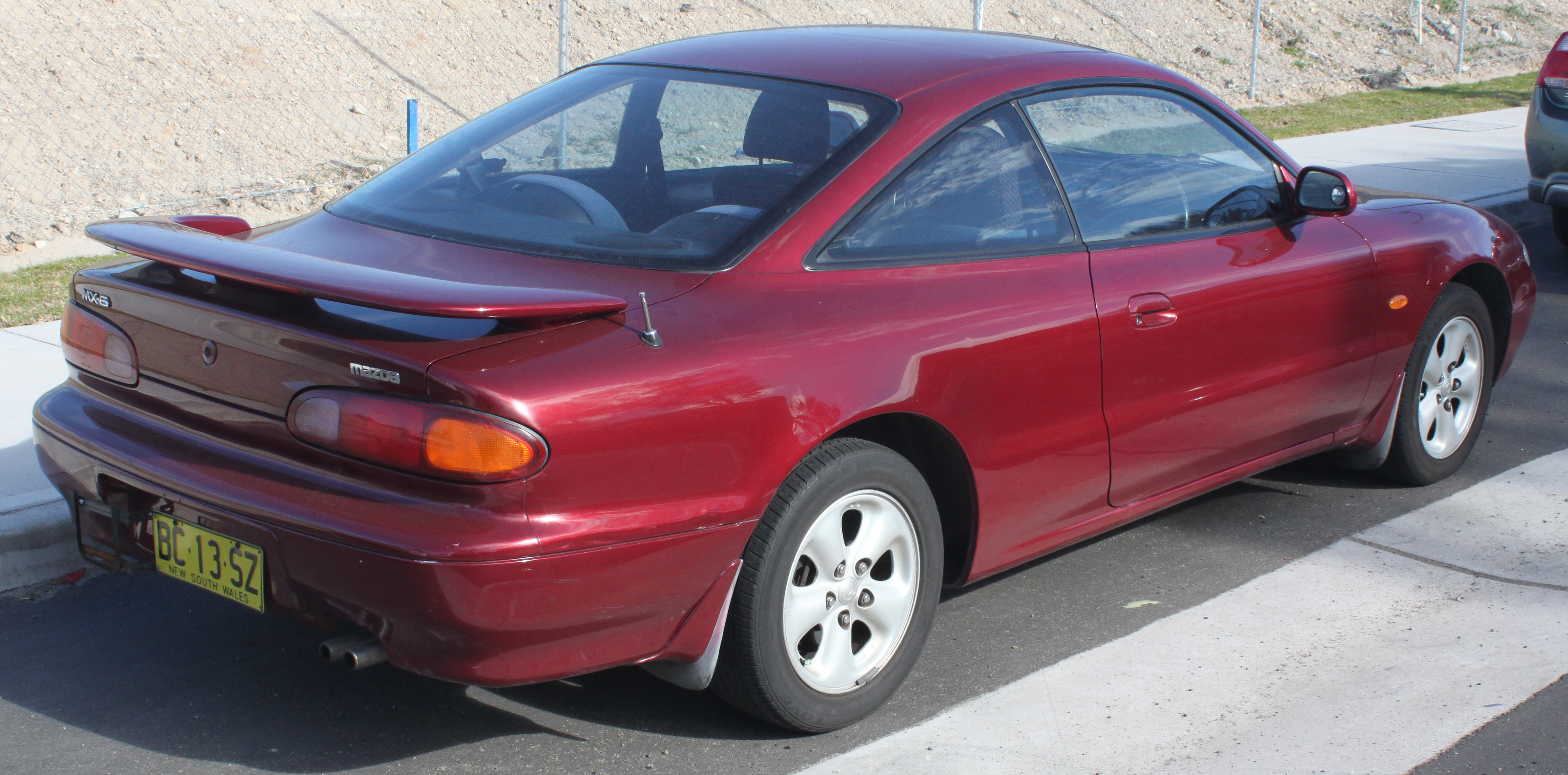 Mazda MX-6 GE